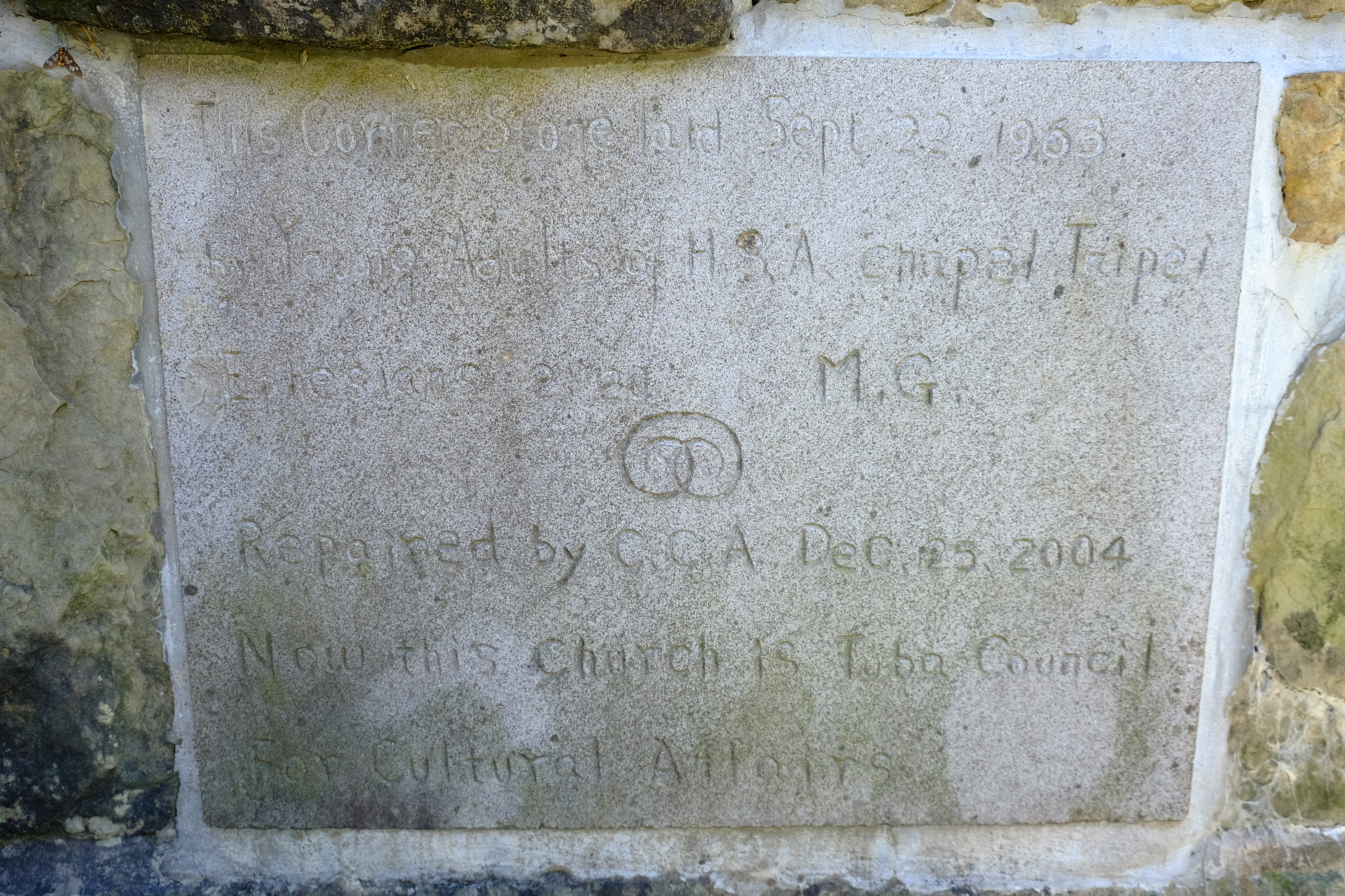 Jiguopai Old Church2016